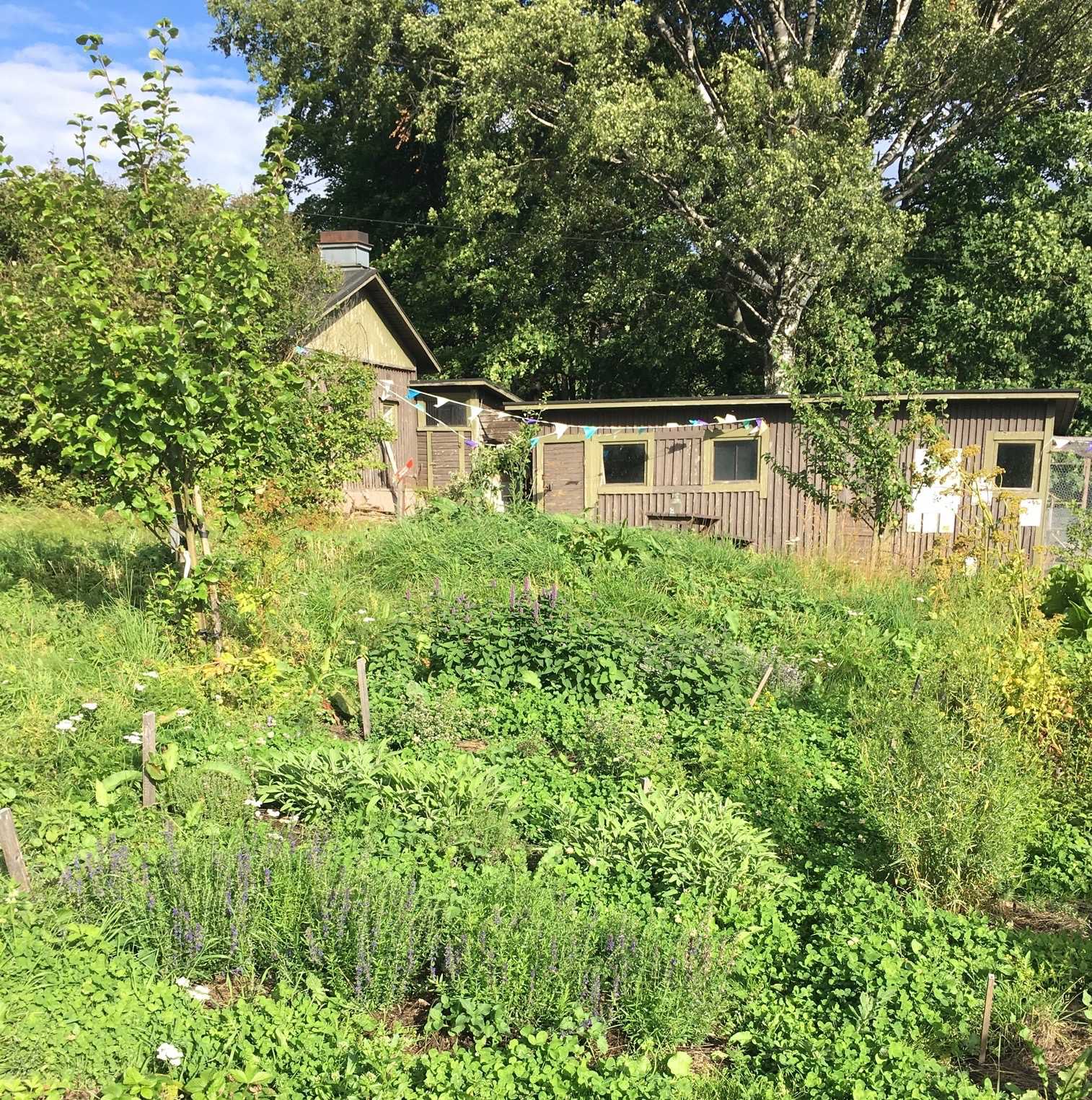 Yrttitarha ja kanalan rakennus. Syötävä Puisto, Helsinki, Mustikkamaa, elokuu 2017